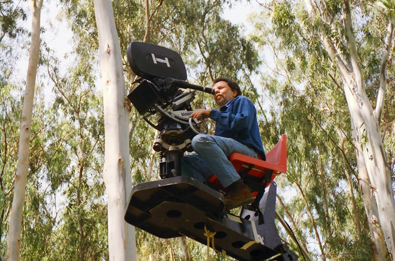 הפקת פרסומת הקרב על המילקי